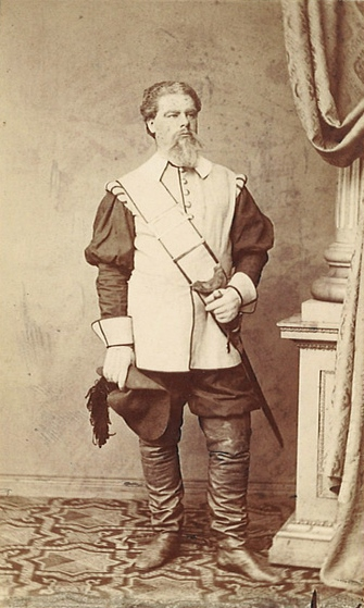 Emil Scaria als Marcel in Die Hugenotten